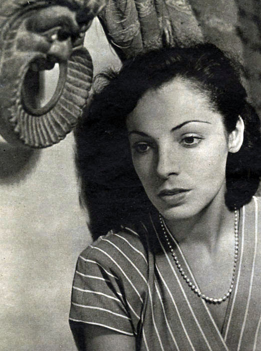 Anna Proclemer nel 1946